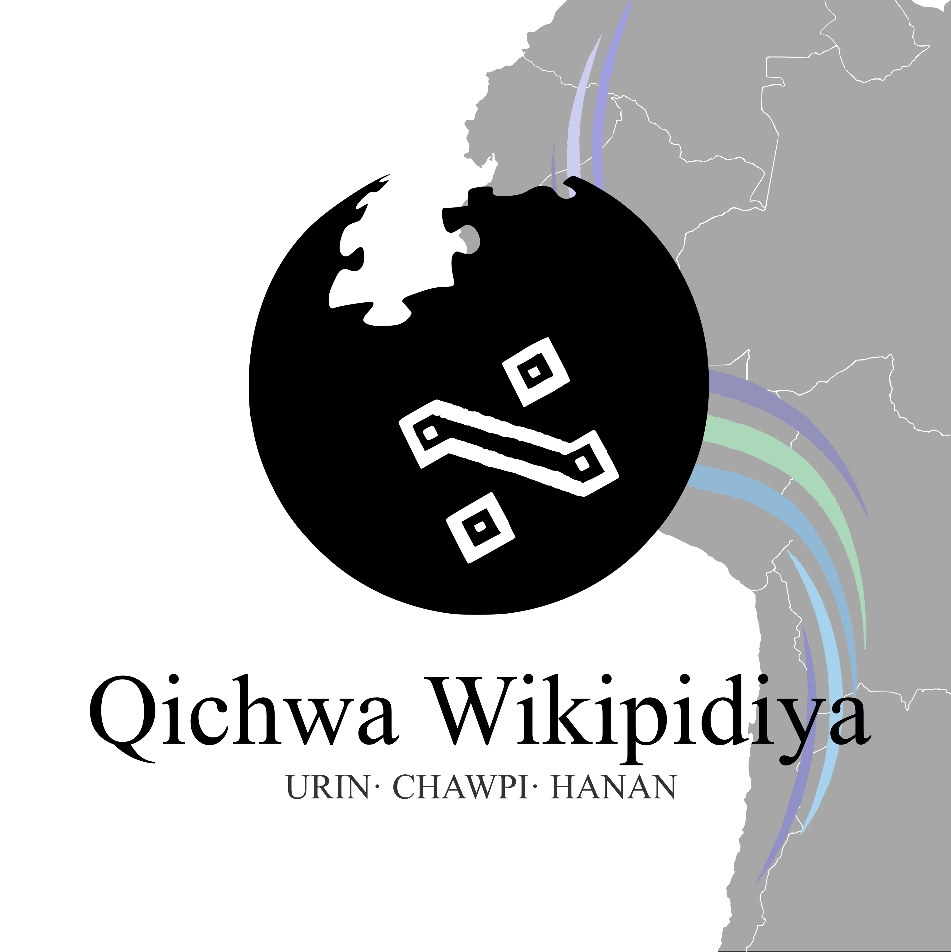 Runa Simi: Kay rikch'ata qichwa simipi Wikipidiyapaq paqarisqam kachkan